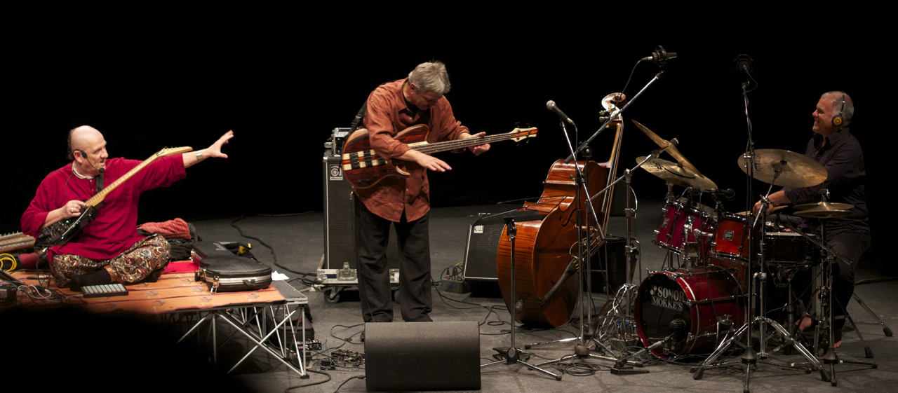 Ares Tavolazzi, Paolo Tofani e Walter Paoli durante un’esibizione degli Area - Reunion Tour a Pontedera (PI).